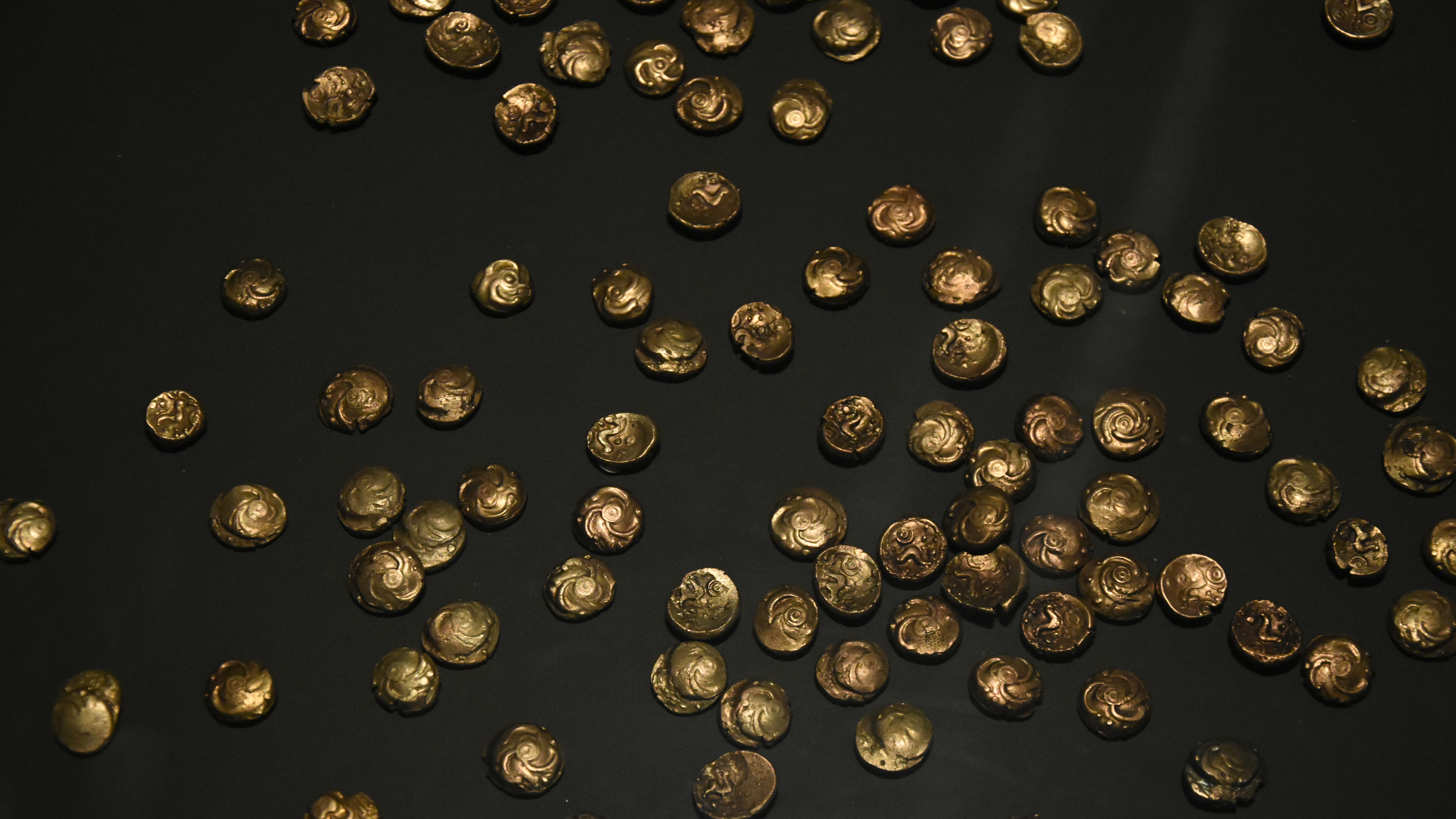 Staters van de Eburonen (Vechmaal goud 55v.Chr.) Gallo-Romeins Museum (Tongeren) 24-03-2018 14-40-59